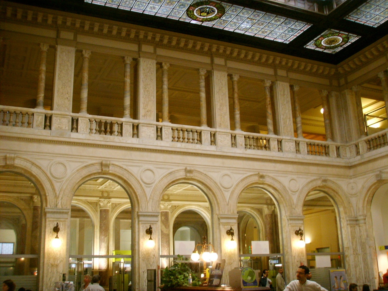 Palazzo delle poste (Firenze), hall 2